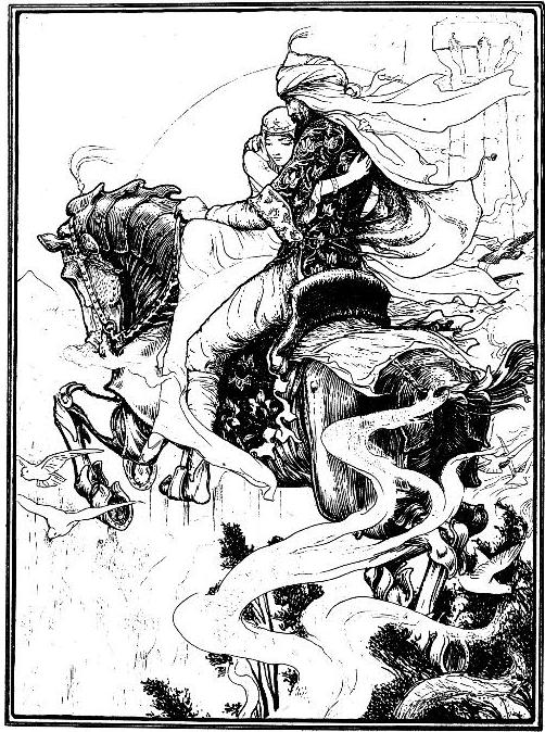 Arabian Nights illustration, frontispiece, depicting the story of the Enchanted Horse